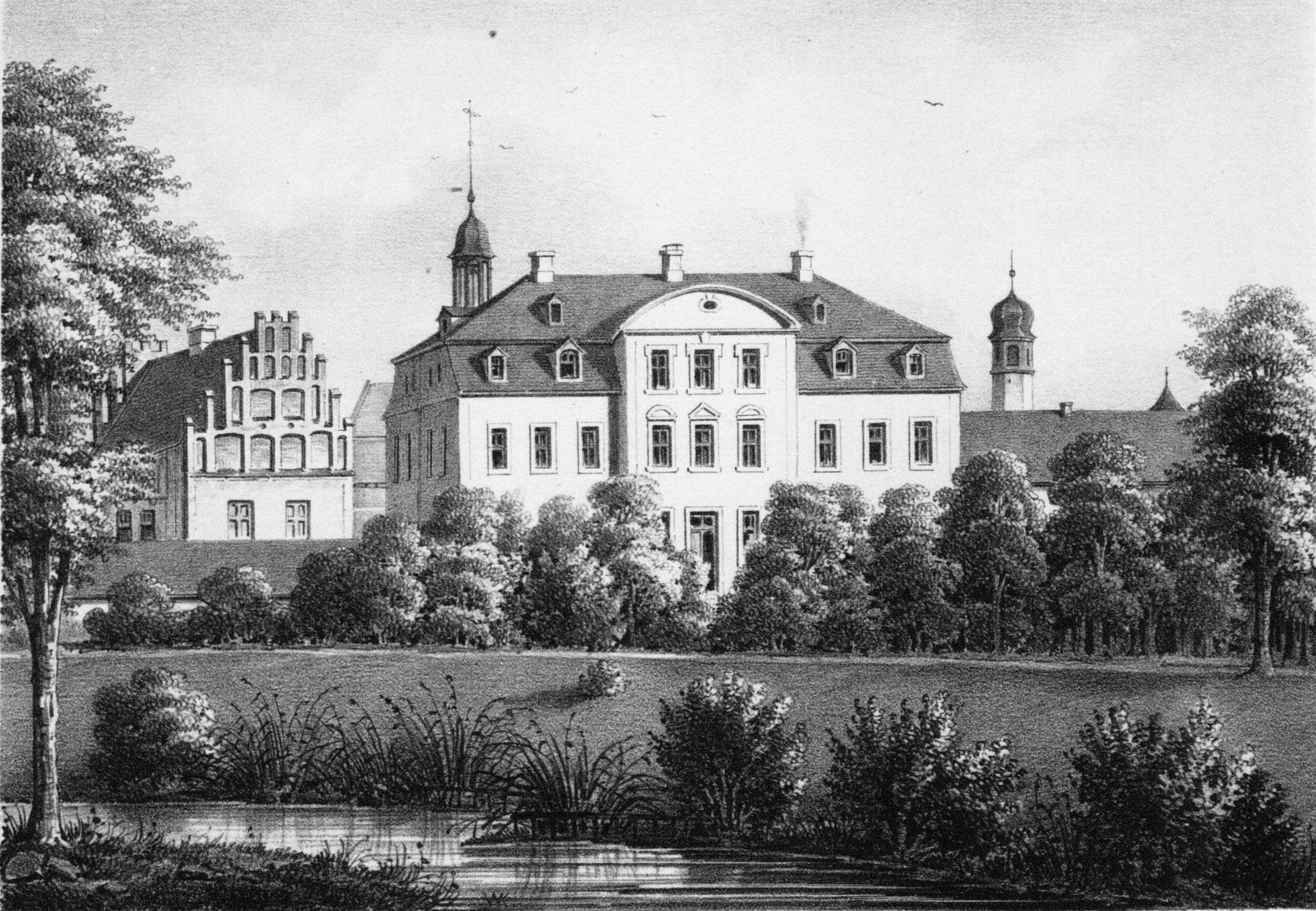 Klostergut Crimmitschau-Frankenhausen um 1800 mit dem 1741 gebauten, 1948 abgerissenen Herrenhaus; im Vordergrund die Pleiße